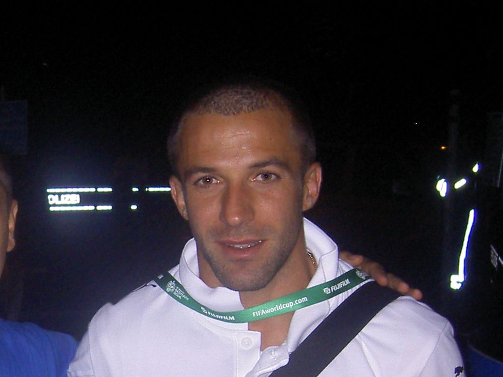 Alessandro del Piero dopo la semifinale del 4 luglio 2006 contro la Germania